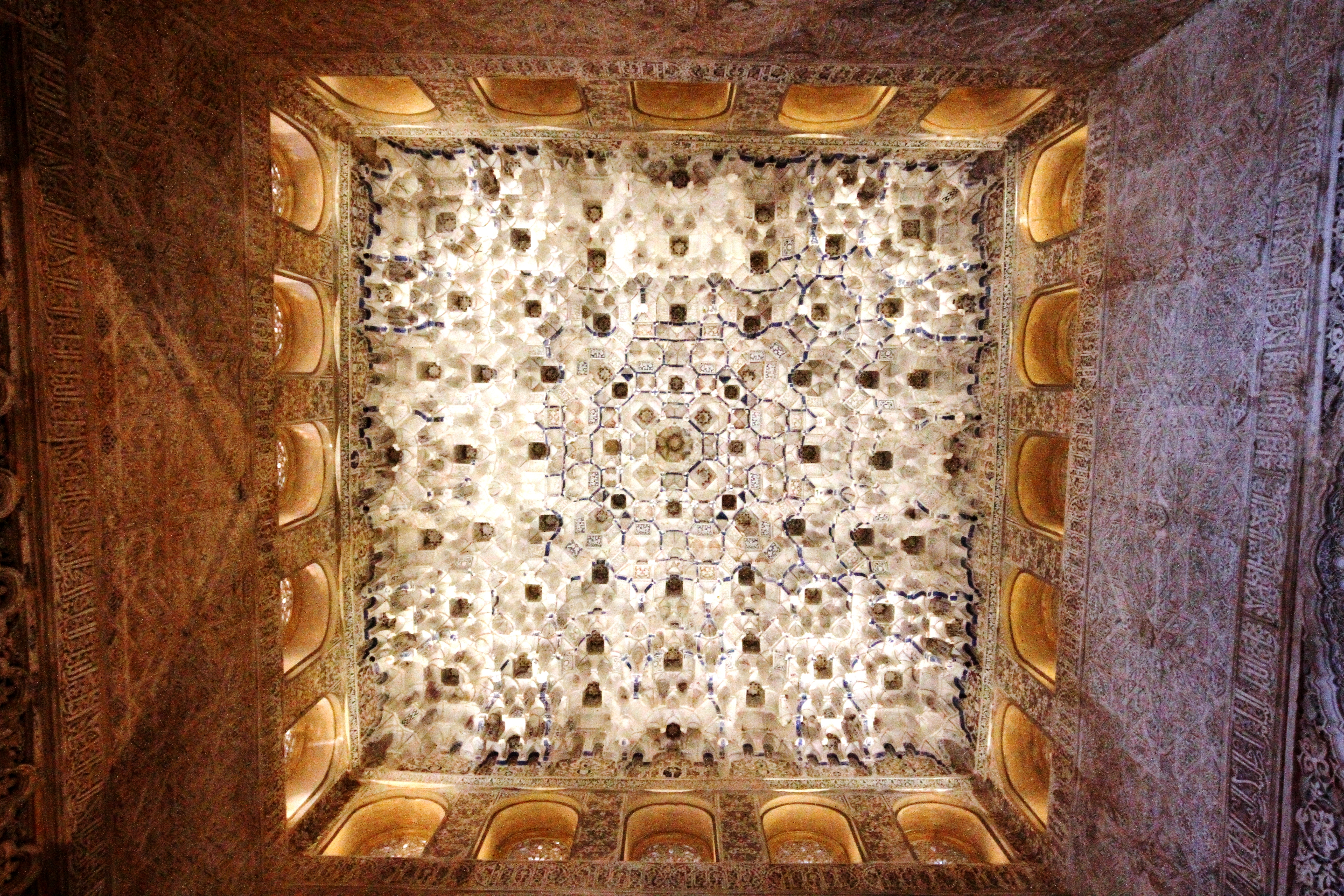 Teto da Sala dos Reis